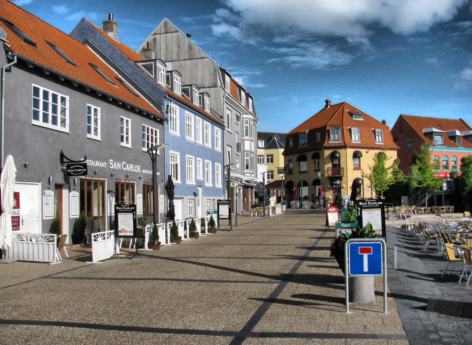 Lodsgade, Frederikshavn